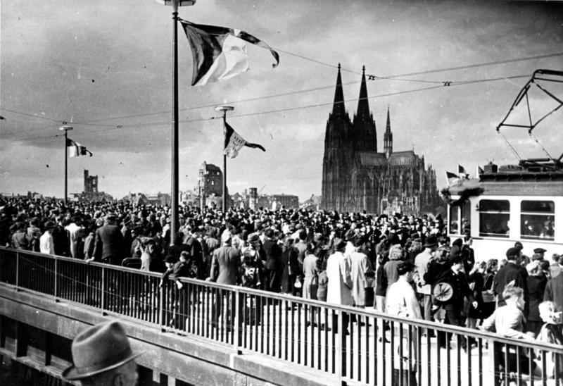 100.000 Menschen passieren die neu eingeweihte Rheinbrücke In Köln wurde am 16-10-48 die erste feste Brücke über den Rhein nach dem Krieg dem Verkehr übergeben. 100.000 warteten auf den Augenblick, die Brücke sofort nach der Einweihung überqueren zu können. Unser Bild zeigt den Andrang auf der neu eröffneten Brücke zwischen Köln und Deutz unmittelbar nach der Freigabe. 17-10-48 Illus-dpd